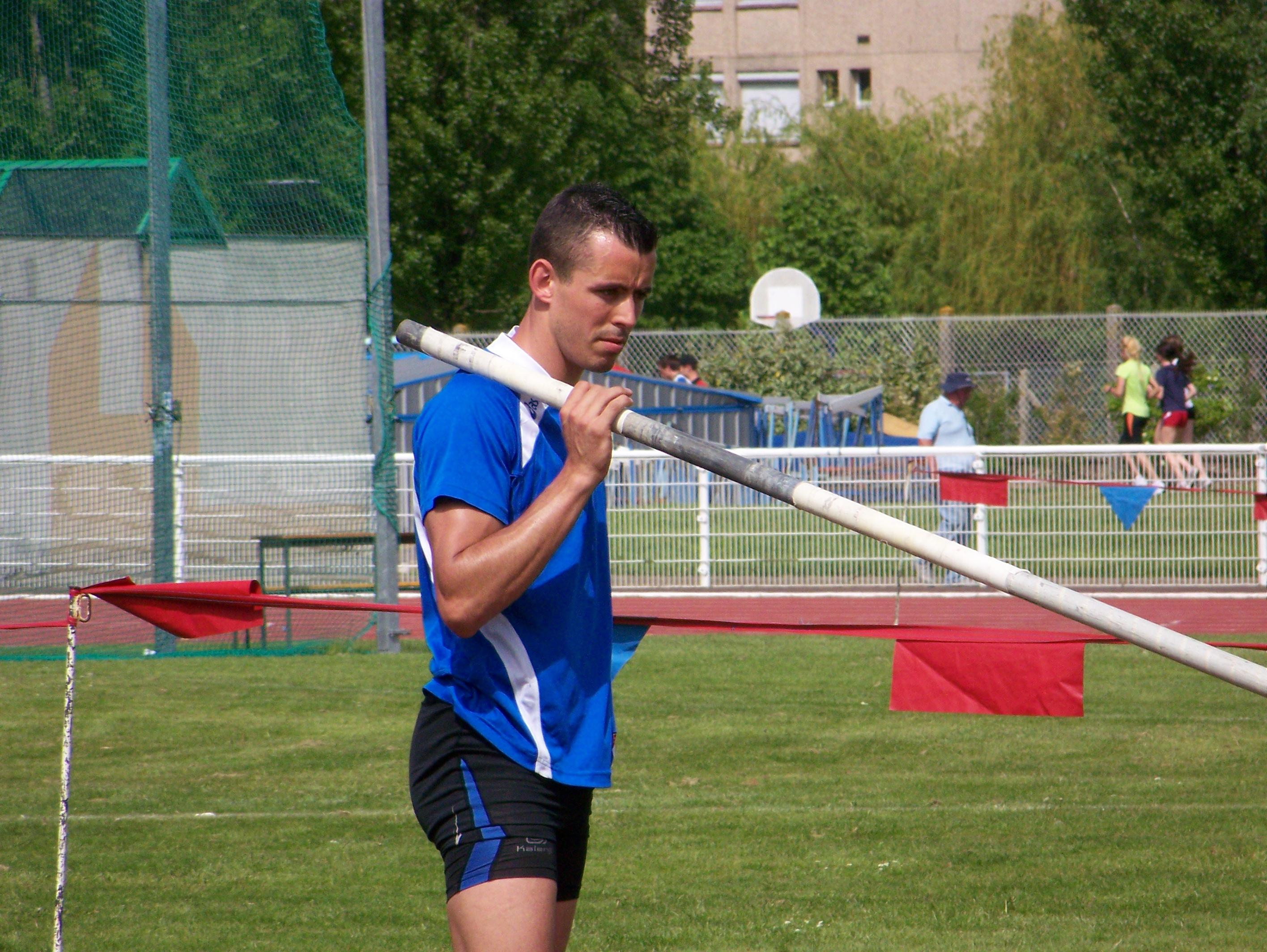 Jérôme Clavier à l'échauffement lors des Interclubs (Tours, France)